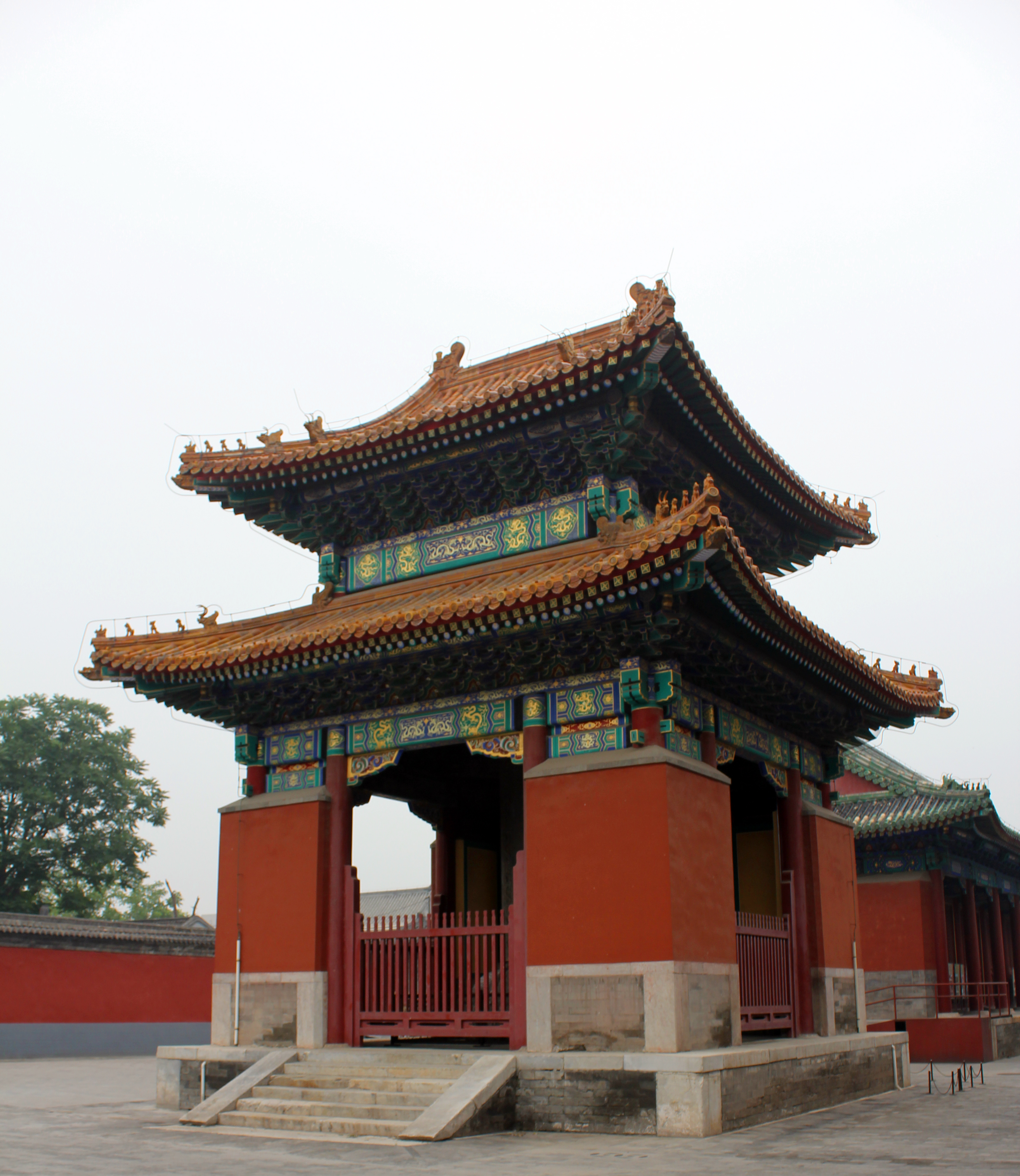 中文（中国大陆）: 全国仅存的保存最完好的历代帝王庙，同时也是北京少见的保留至今的明代建筑。